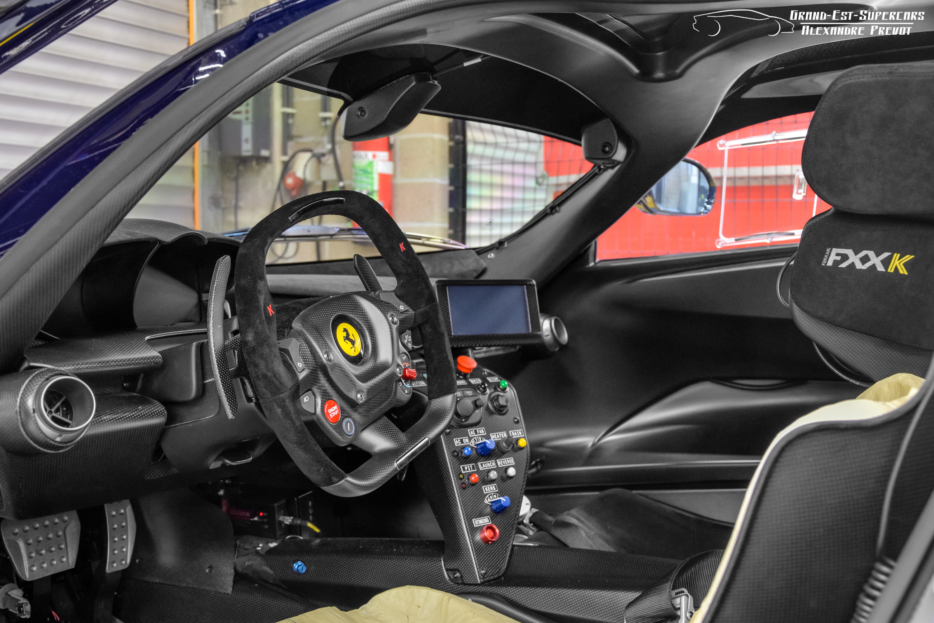 S/N : 212176 Numéro : 15